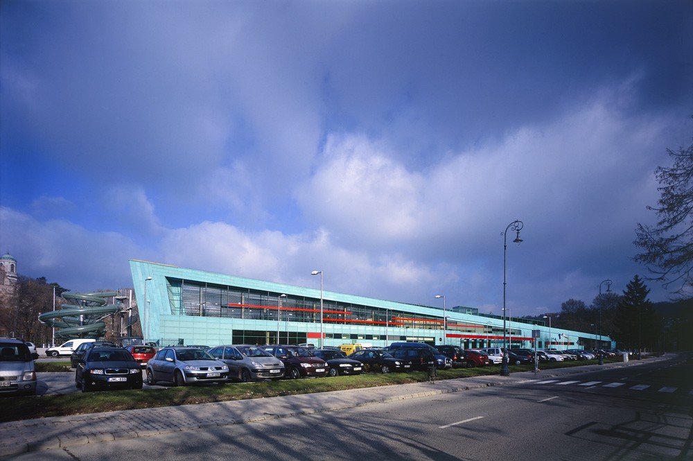 Esztergom, Aquasziget Gyógy-, Termál- és Élményfűrdő